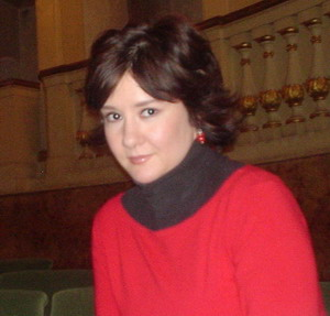 Gonzáles Mónika opera-énekesnő